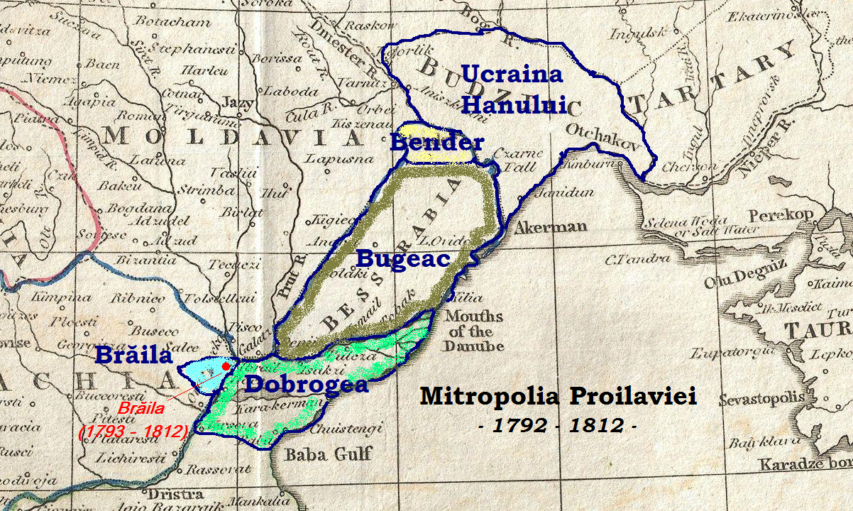 Harta arată teritoriile aflate sub jurisdicţia Mitropoliei Proilaviei, între anii 1792 - 1812